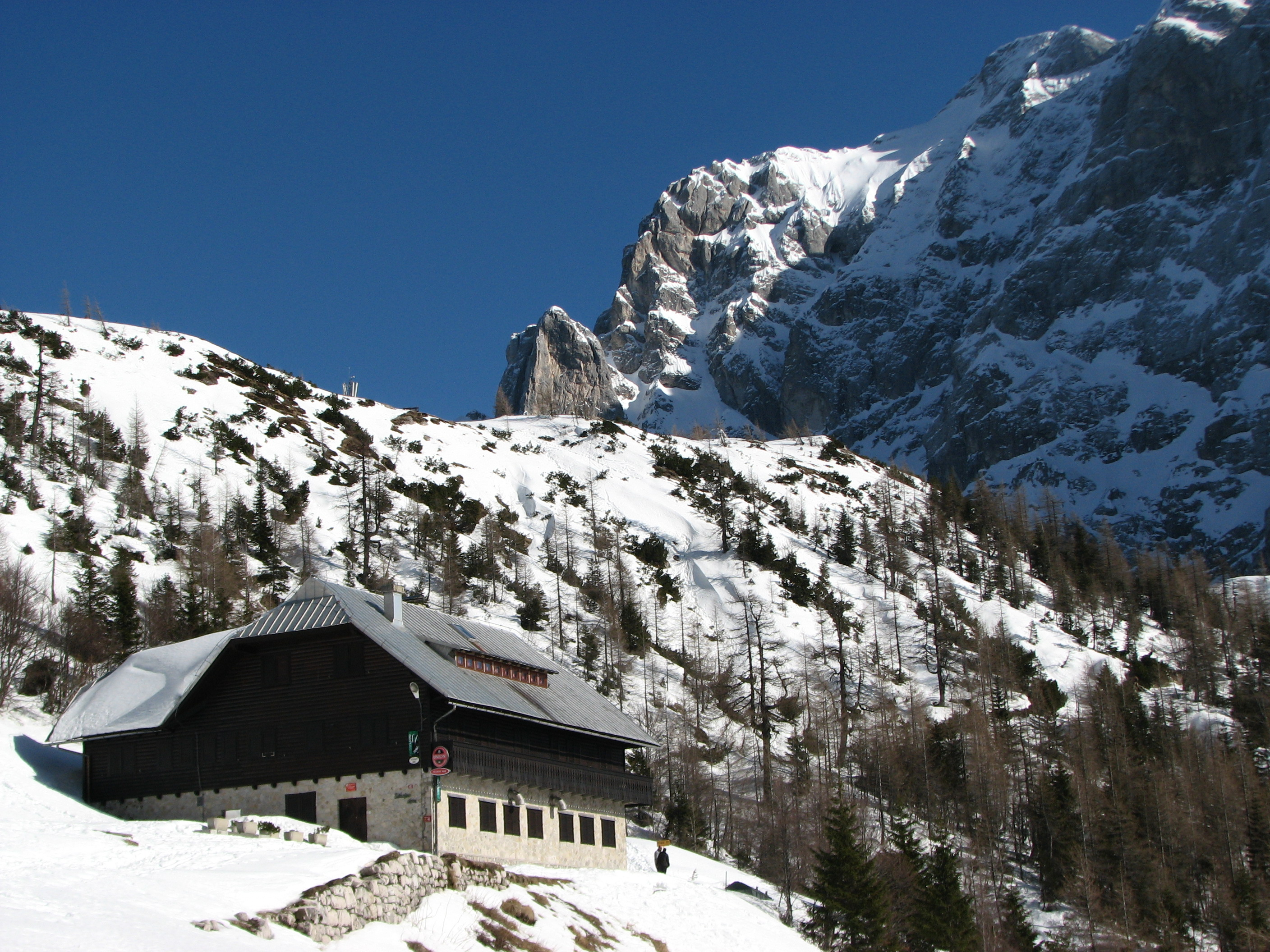 Tičarjev dom na Vršiču; v ozadju Hudičev steber in vzhodni del severne stene Prisojnika, Julijske Alpe, Slovenija